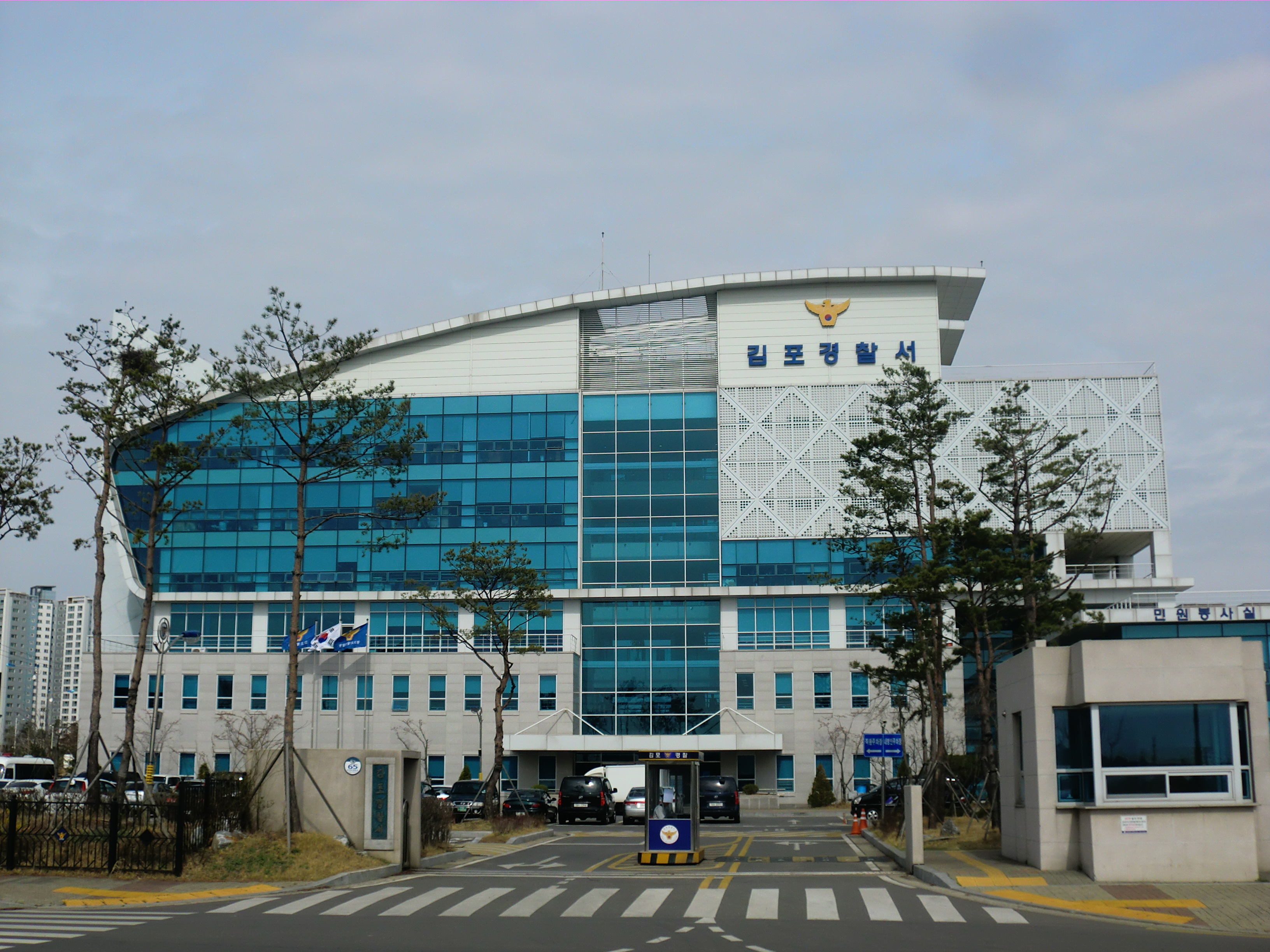 경기도 김포시에 있는 김포경찰서